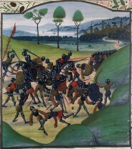 Bataille de Poitiers (Bataille de Maupertuis), 1356, Chroniques d'Angleterre de Jean de Wavrin